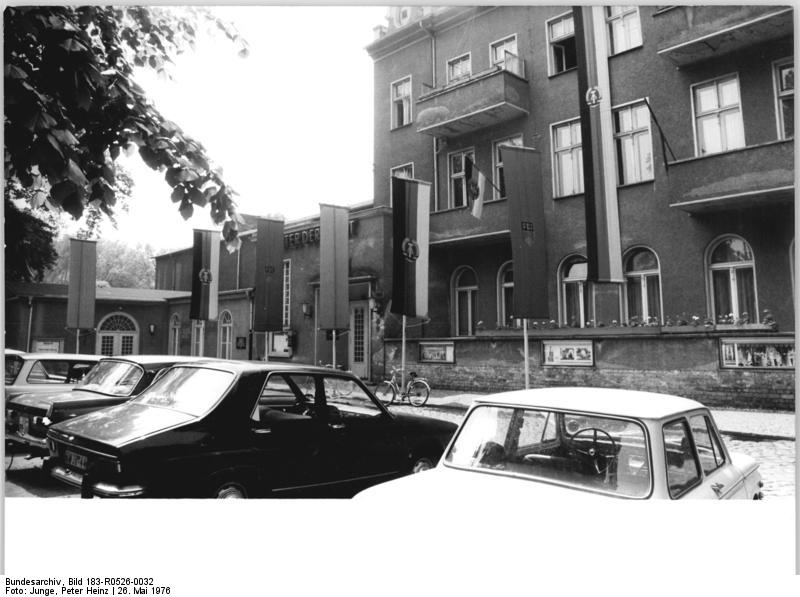 Brandenburg, Grabenstraße, Theater ADN-ZB Junge 26.5.76 Berlin: Blick auf das Theater der Stadt Brandenburg in der Grabenstraße. Hier fand vom 8.6. - 10.6.1946 das I. Parlament der FDJ statt. Auf dem historisch bedeutsamen I. Parlament wurden die vier Grundrechte der jungen Generation beschlossen. Bitte verwenden Sie dazu auch Foto R 0526-33N von der Gedenktafel.